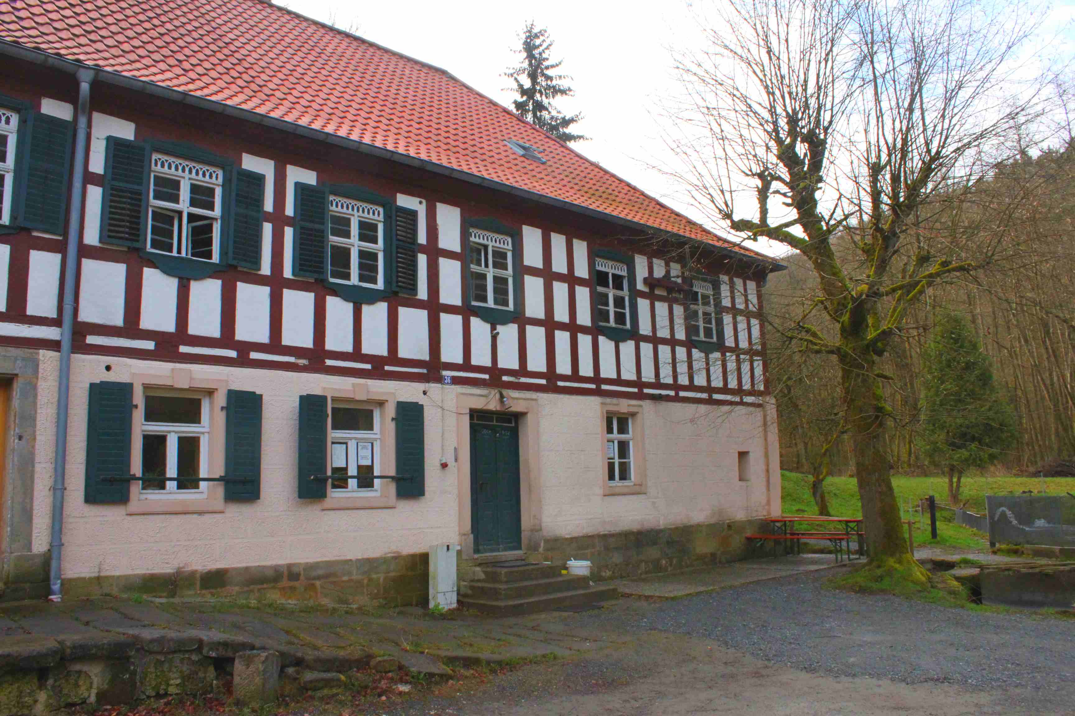 Die im Bärental gelegene Herbstmühle